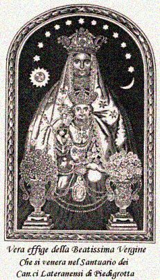 Vera effige della Beatissima Vergine che si venera nel Santuario dei Canonici Lateranensi di Piedigrotta, Napoli